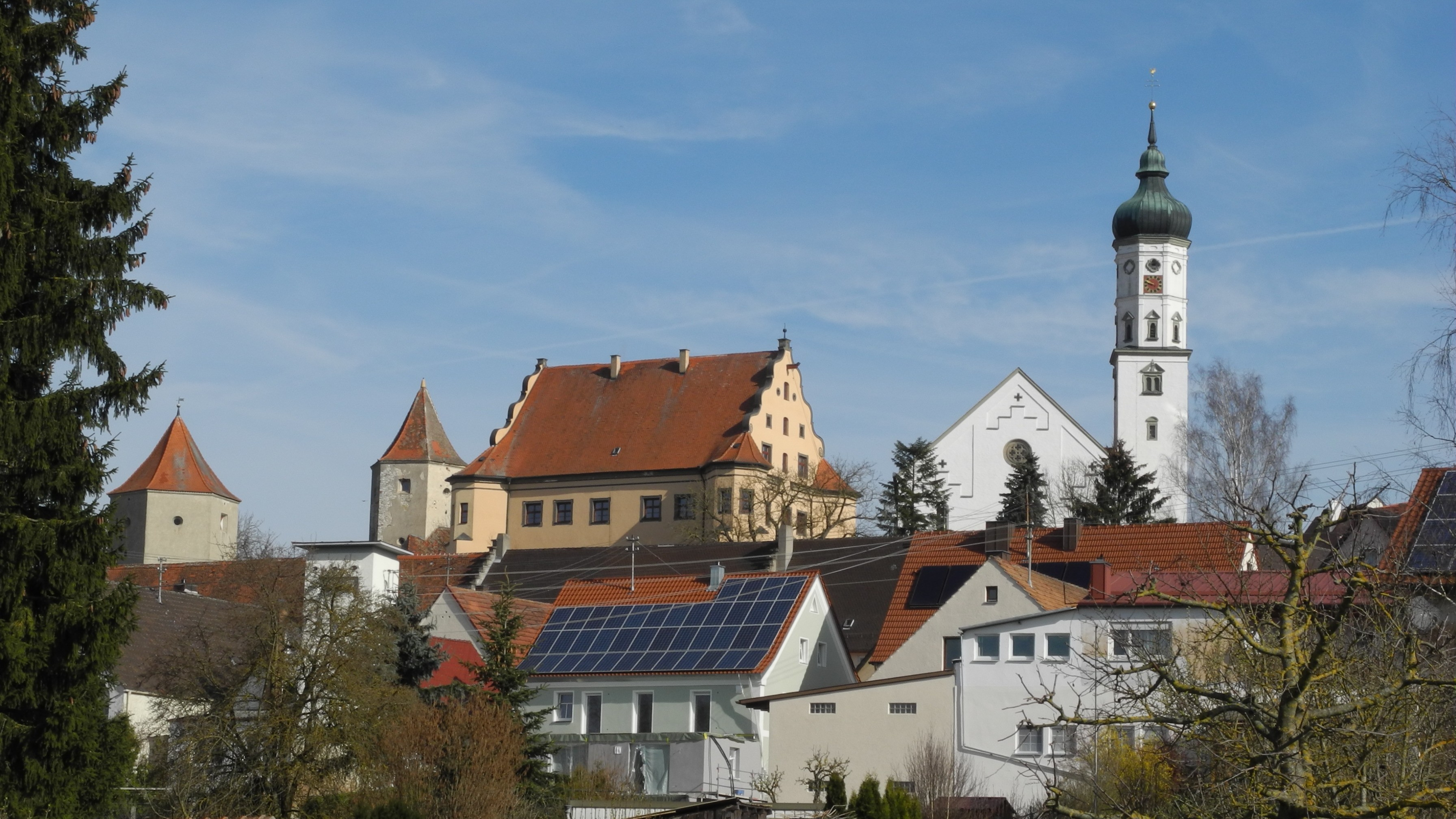 Bissingen(Bayern) - Sicht von Süden, Schloss und Kirchturm02